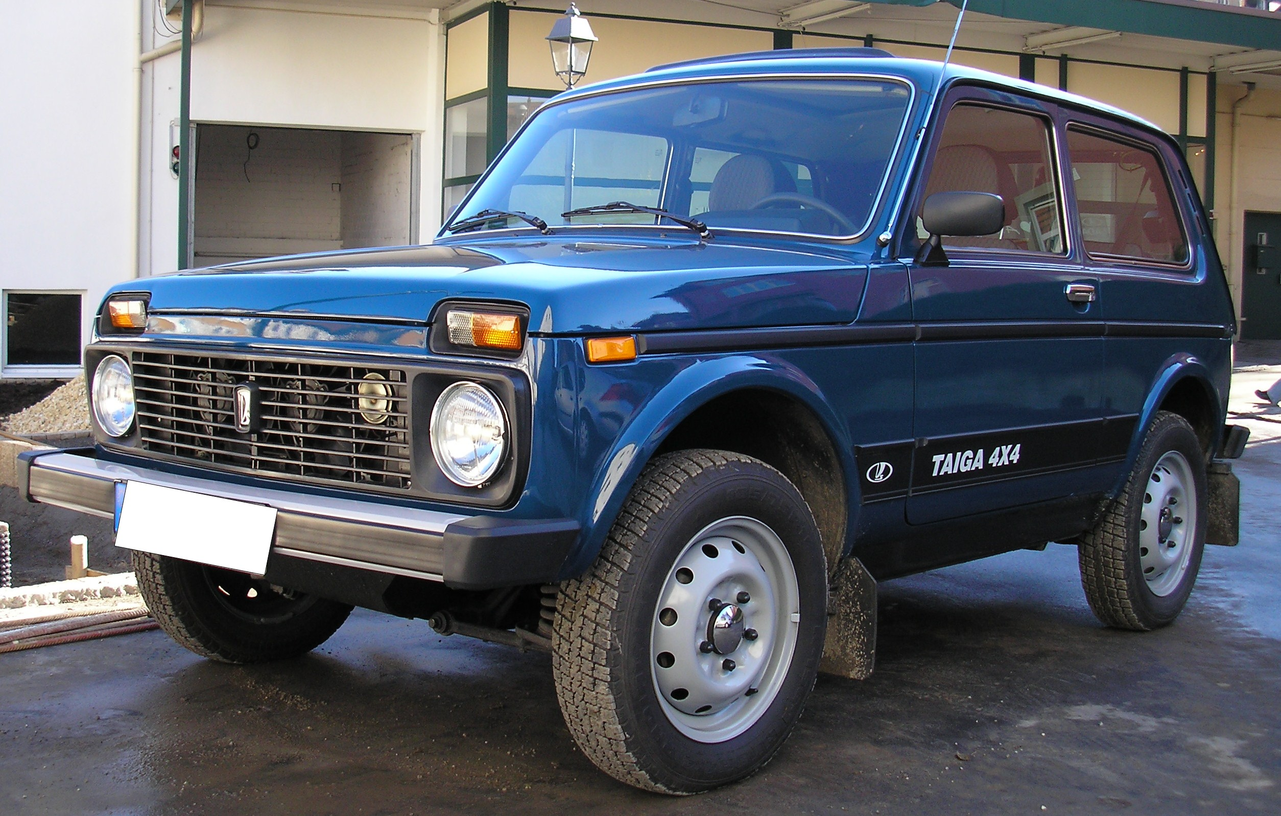 Lada Niva, late version